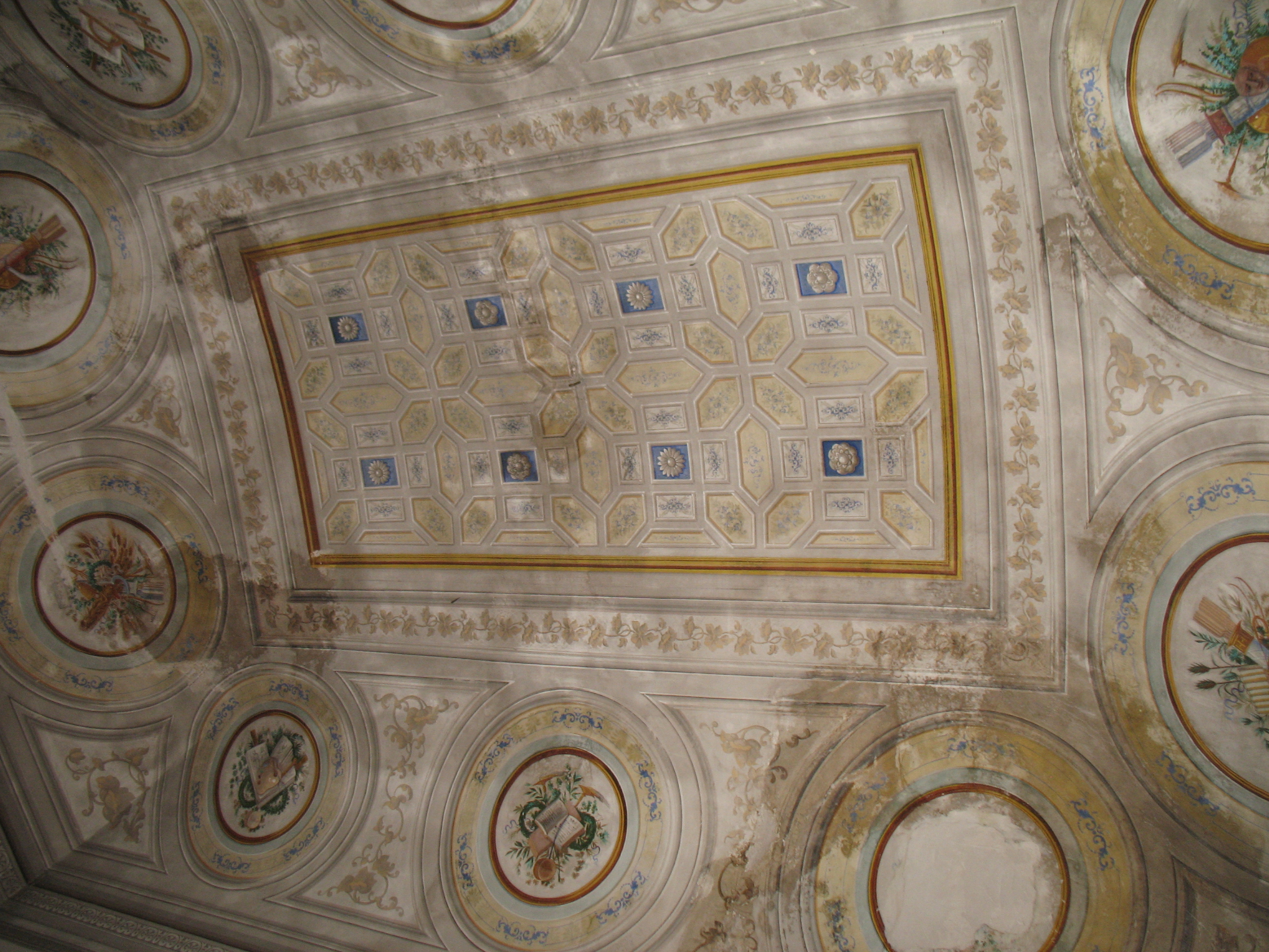 Soffitto affrescato di un salone di Palazzo Lepri a Chieti